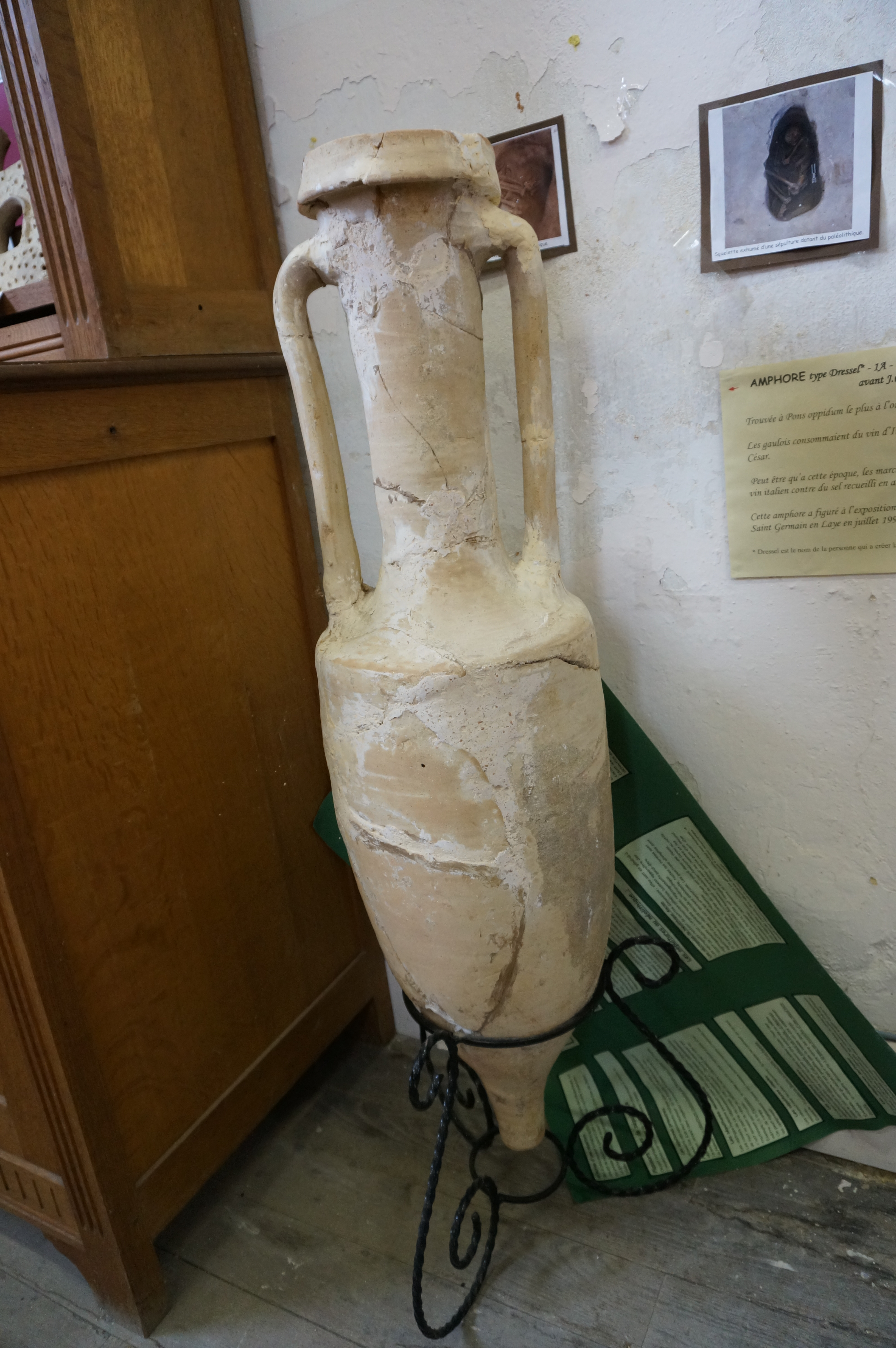 Présenté au Musée archéologique de Pons.